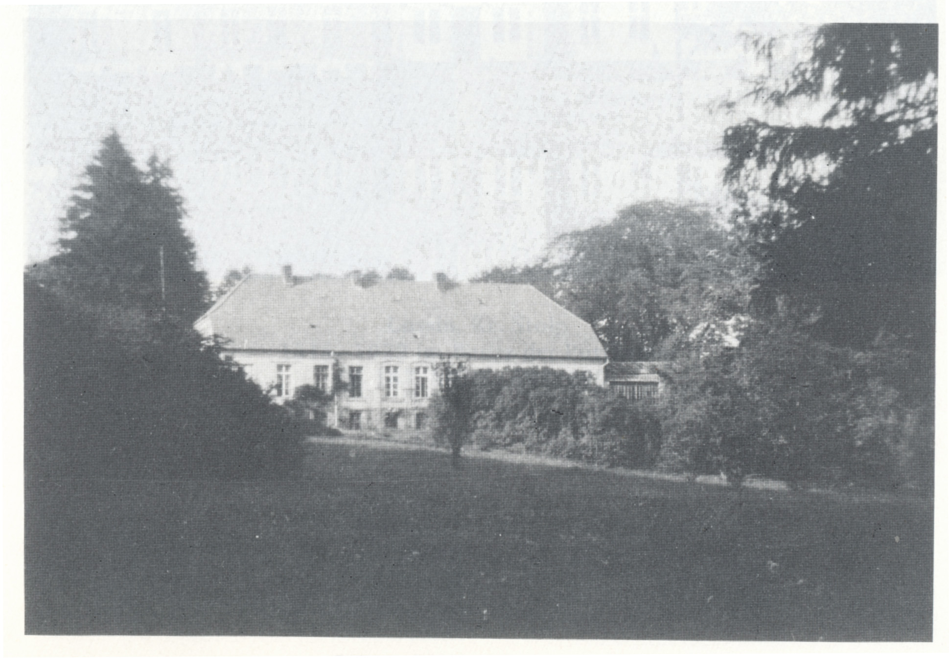 Role - dwór Puttkamerów